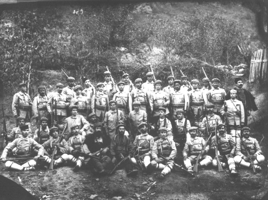 Kriva Palanka cheti of Petar Angelov and Mitso Kirliev